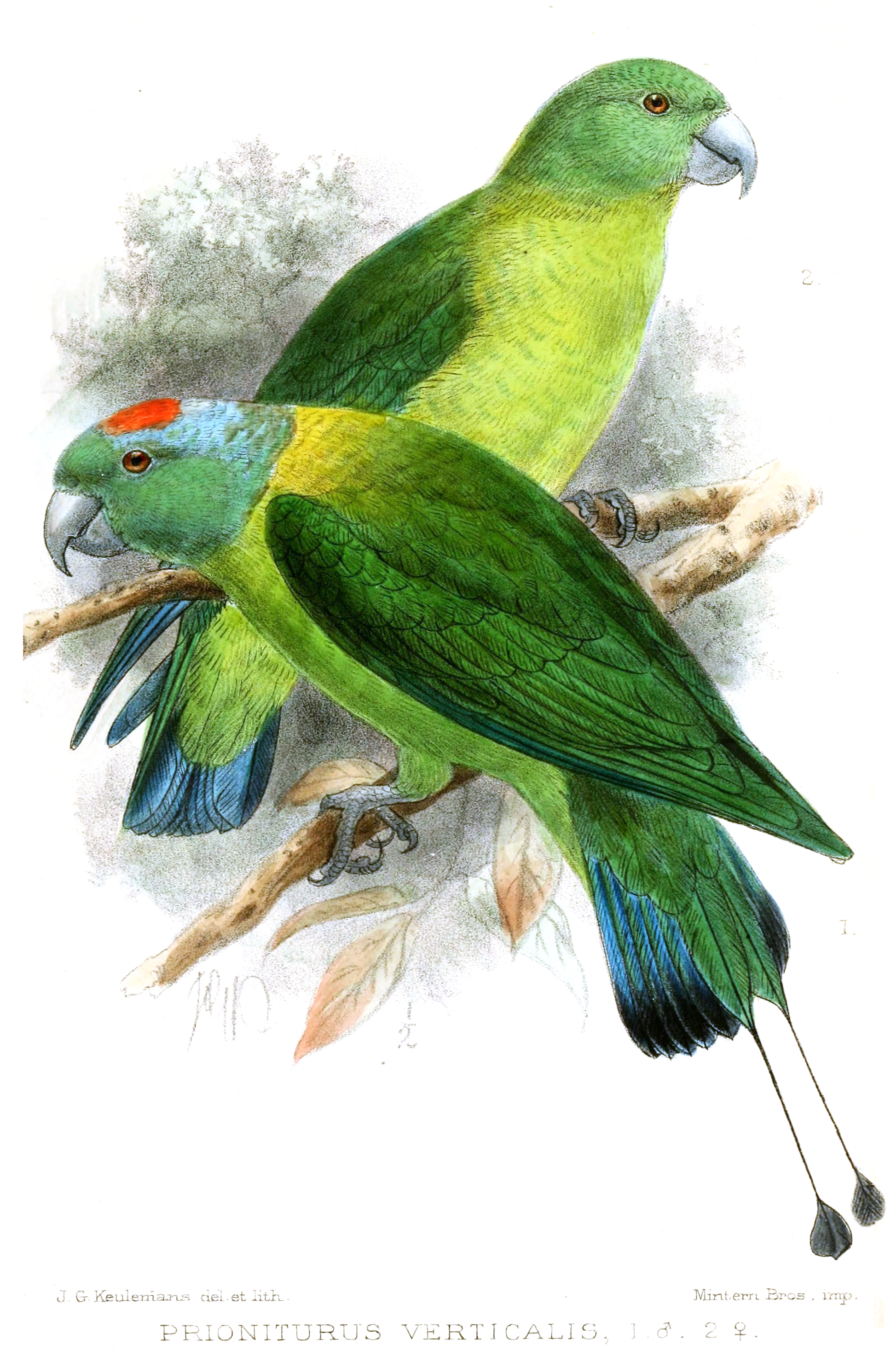 Prioniturus verticalis